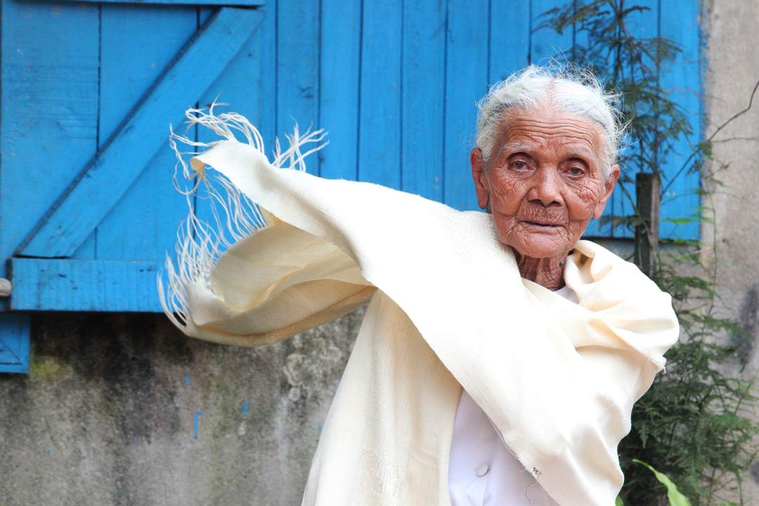 Bejaarde Merina-vrouw met een witte lamba akotofahana, Madagascar